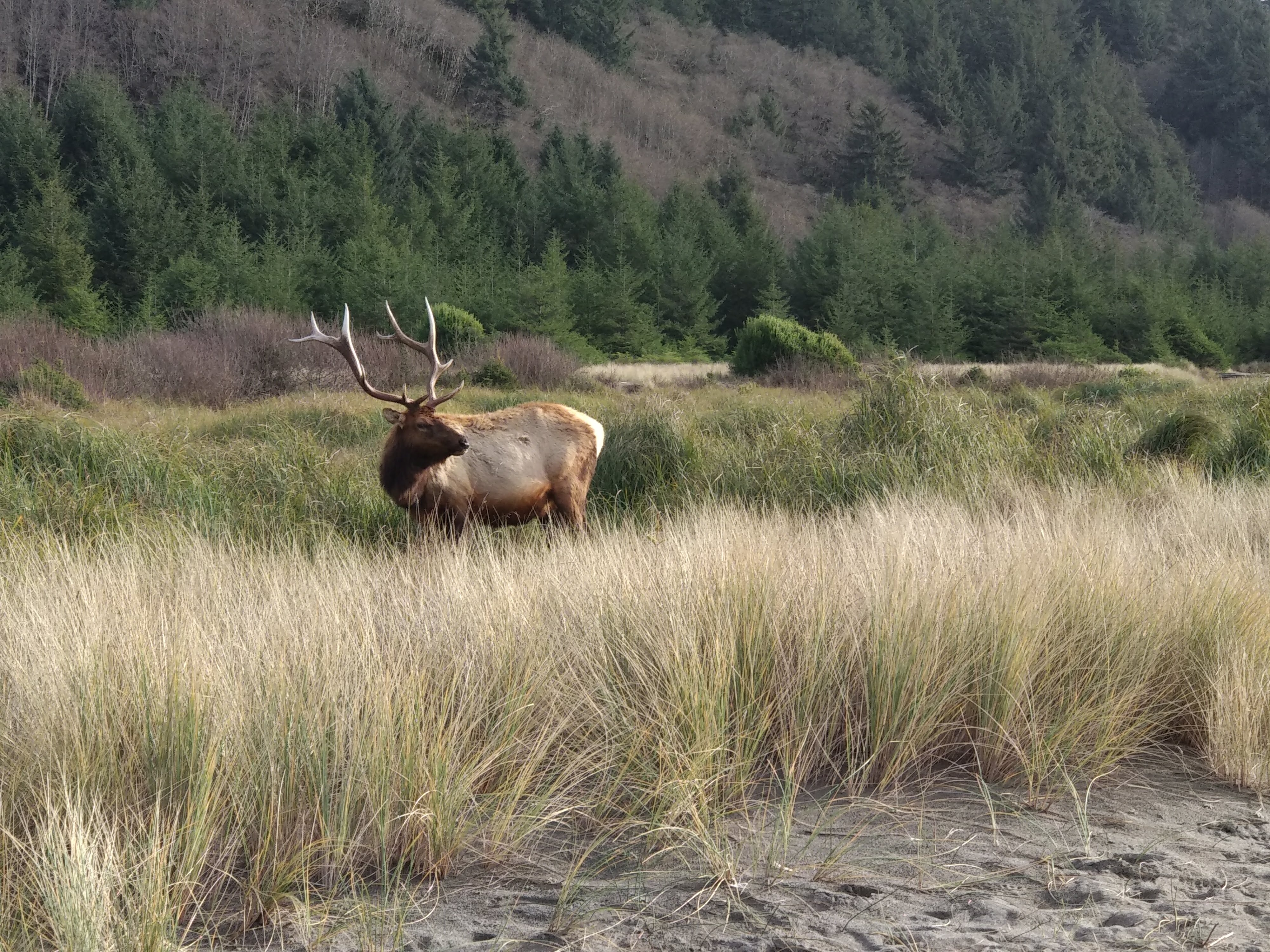 Redwood National and State Parks, Северная Калифорния.